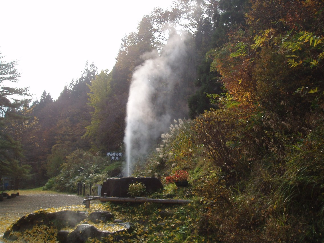 宮城県鬼首温泉郷吹上温泉間欠泉「弁天」